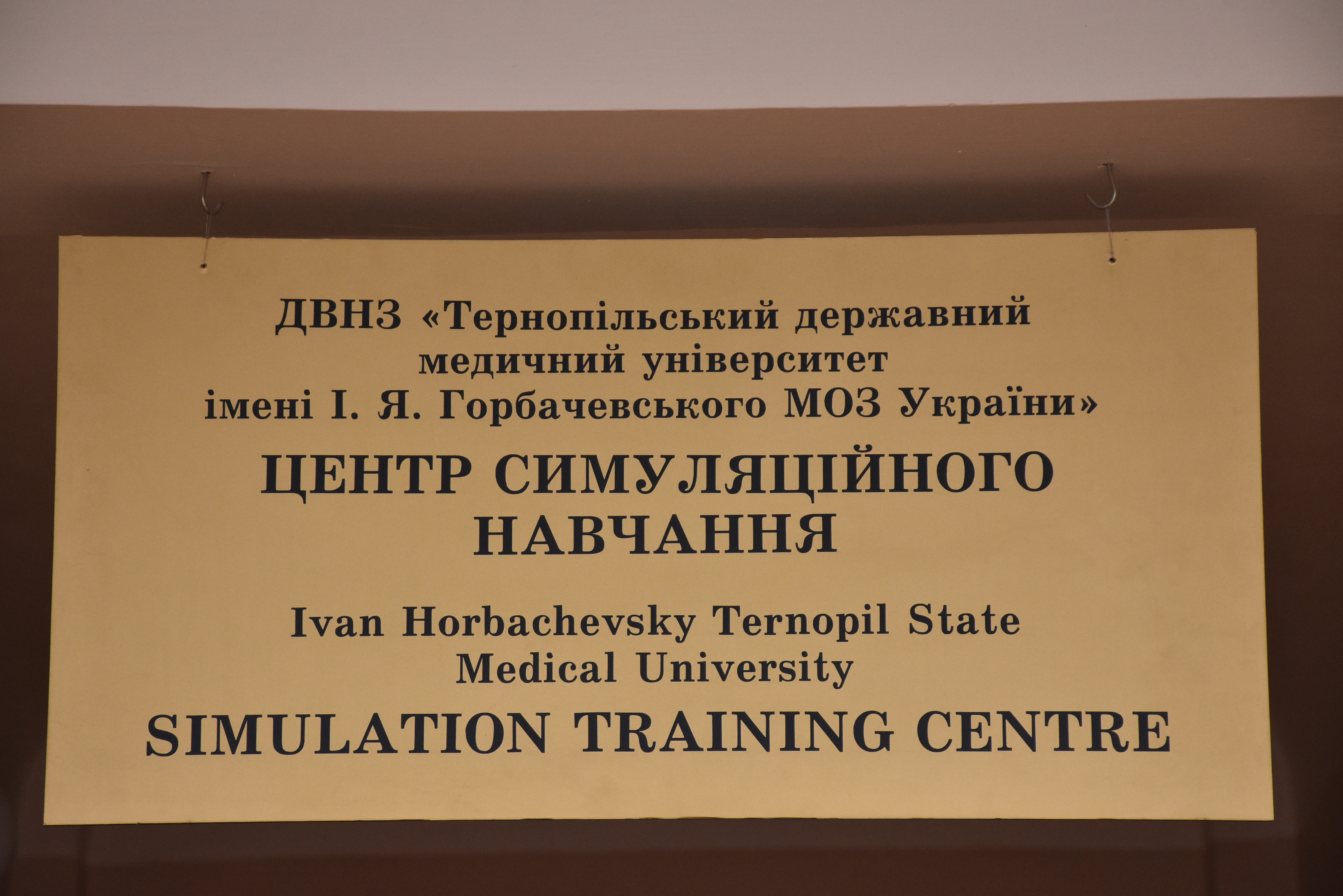 Центр симуляційного навчання Тернопільського державного медичного університету імені І. Я. Горбачевського.